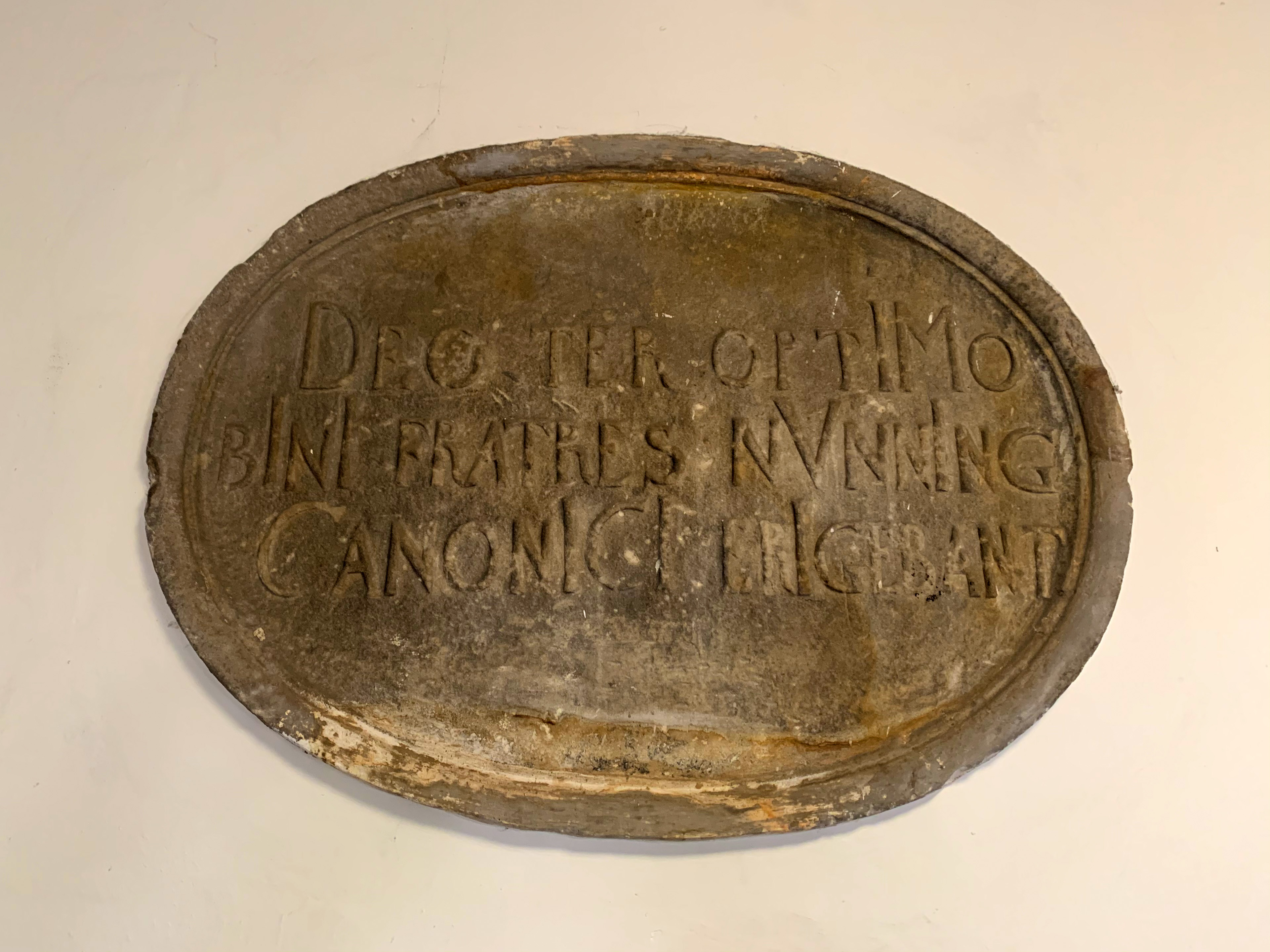 Gedenkstein an den Bau der katholischen Schule auf Burg Altena (Schüttorf) - derzeit eingesetzt im Anbau von 1932 an der katholischen Schule an der Süsterstraße